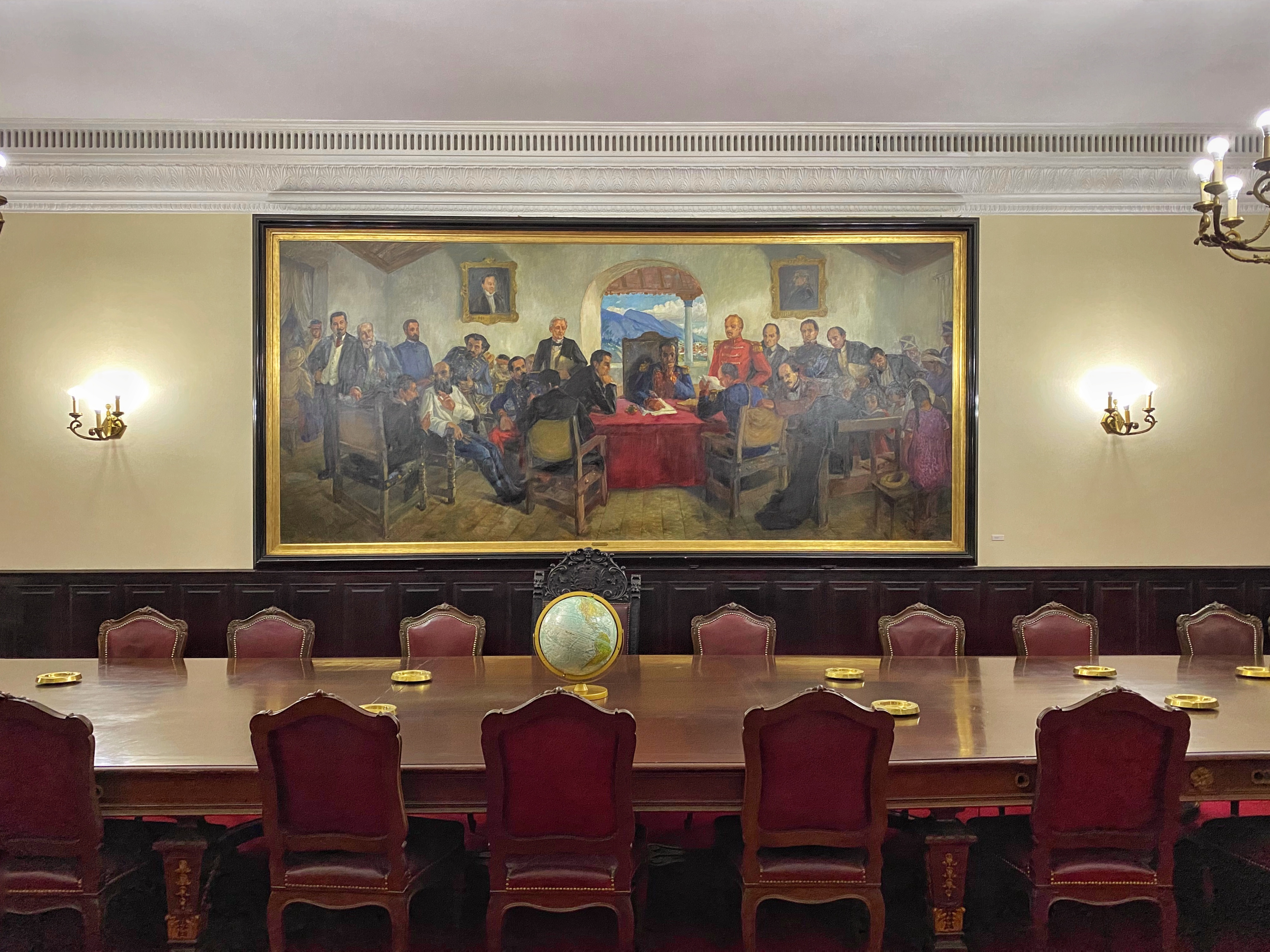 Salón del Consejo de Ministros de la antigua Residencia Presidencial La Casona, convertida a partir de 2019 en centro cultural. En detalle se ve la obra de Tito Salas, Los Causahabientes.